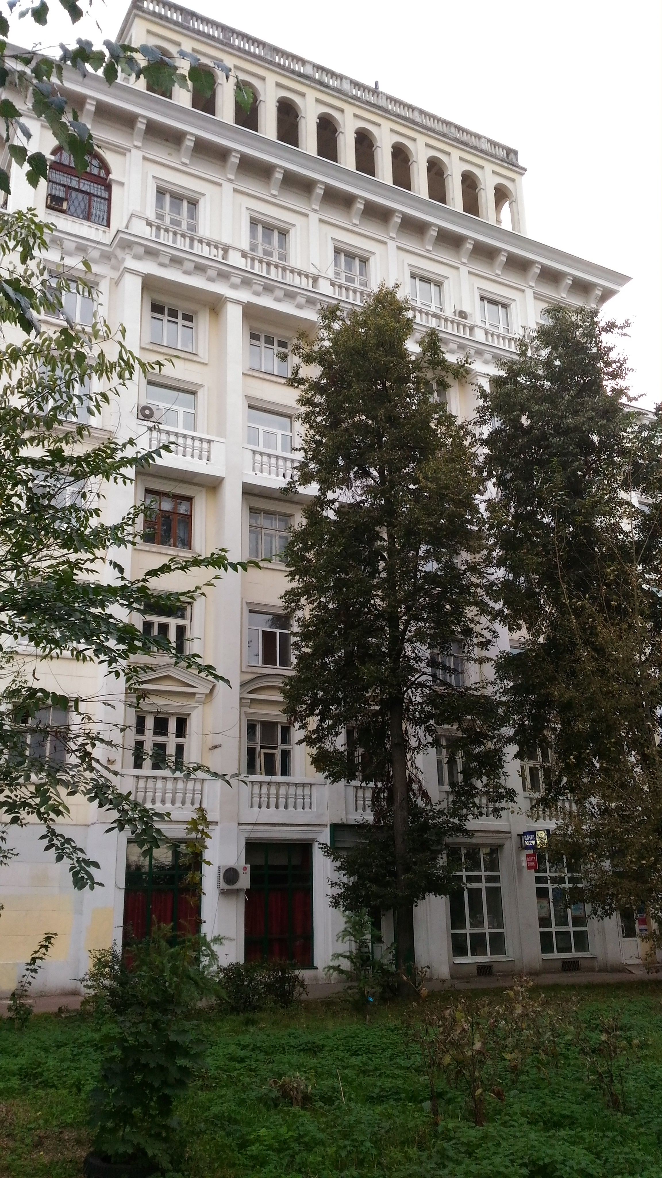 Нижний Новгород. Жилой дом завода «Нефтегаз»